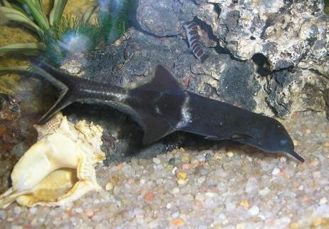 el pez elefanteee